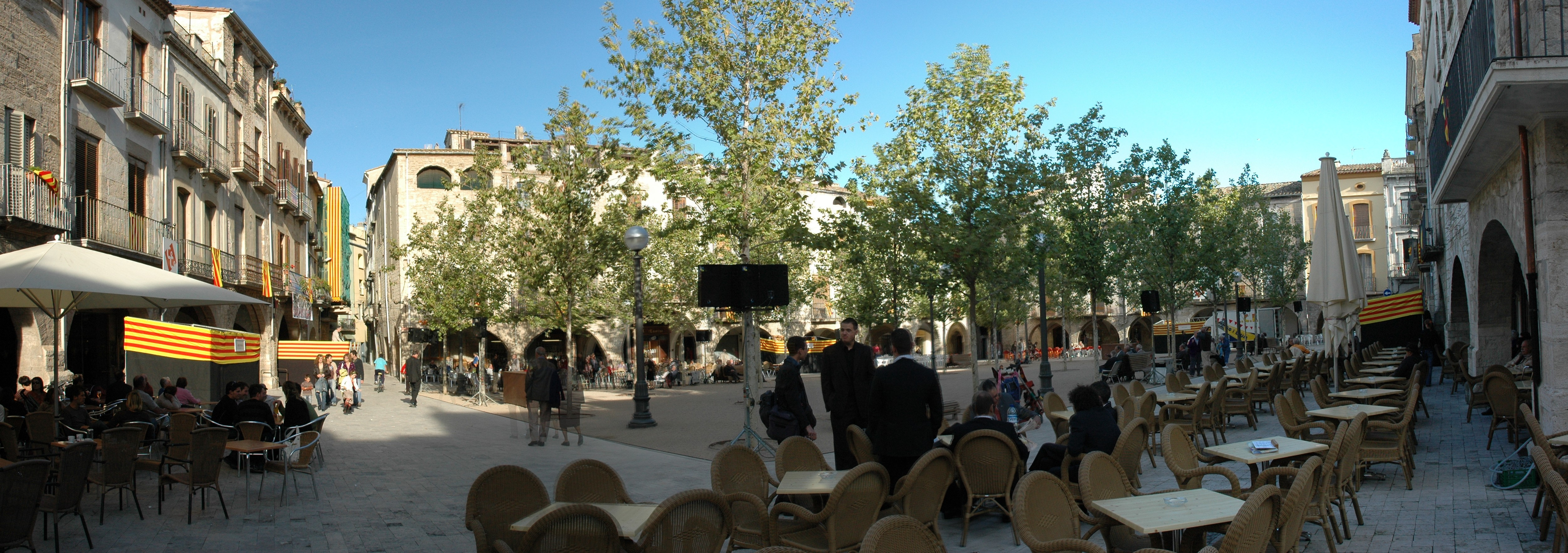 Plaça Major de Banyoles